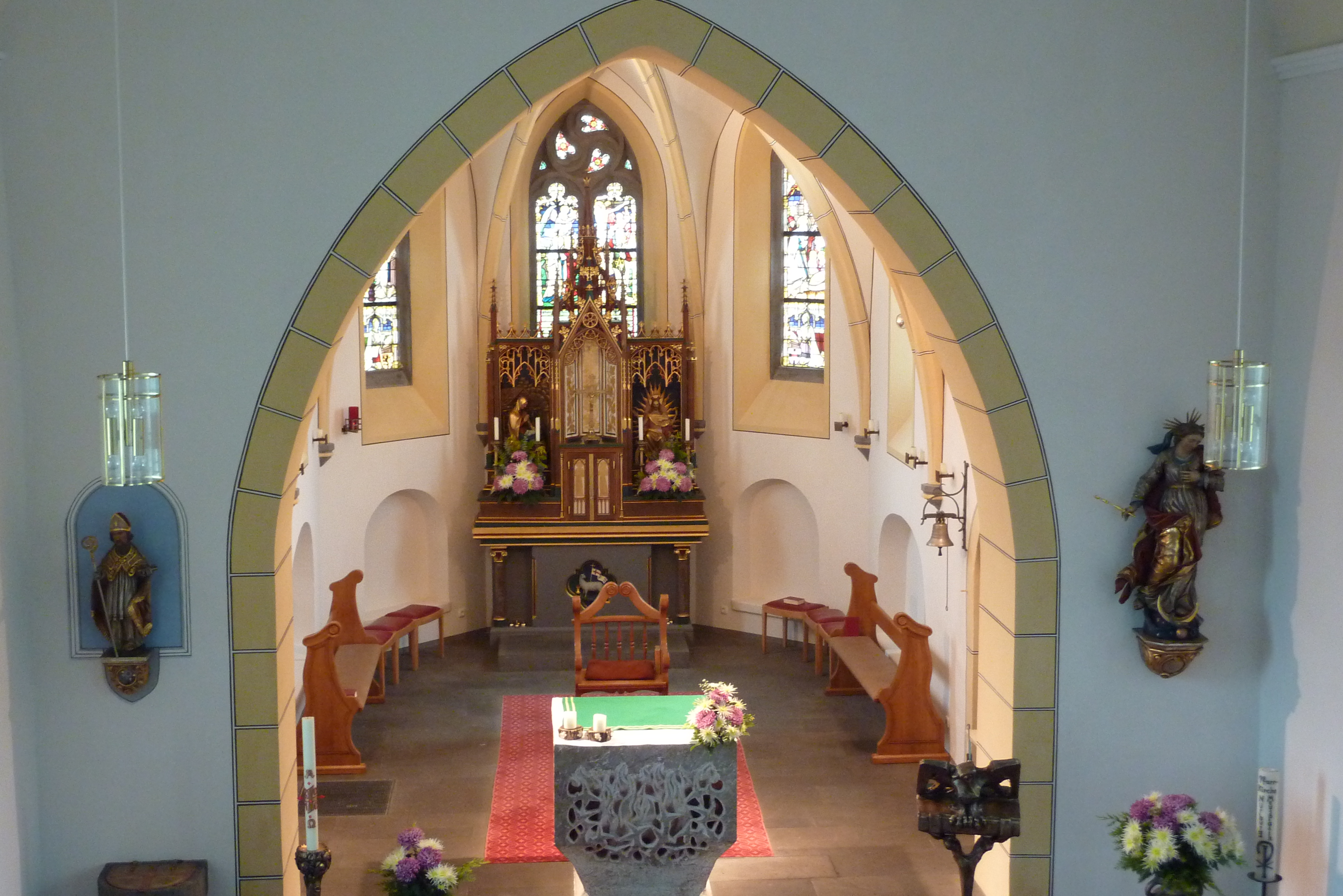 Katholische Pfarrkirche St. Nikolaus in Nürburg, Chor von der Orgelempore aus gesehen